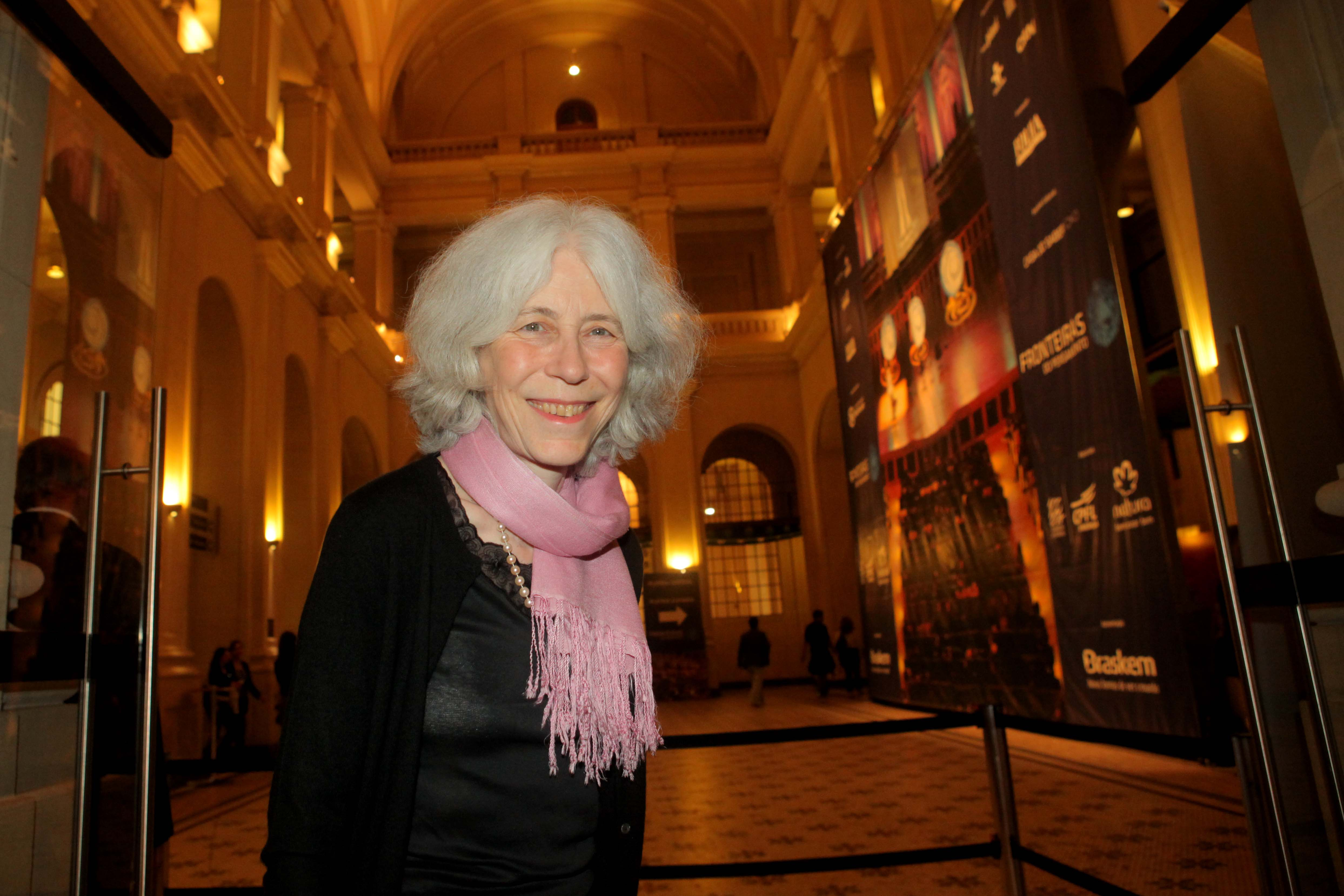 Emma Rothschild, historiadora da economia, Professora em Harvard, esposa de Amartya Sen